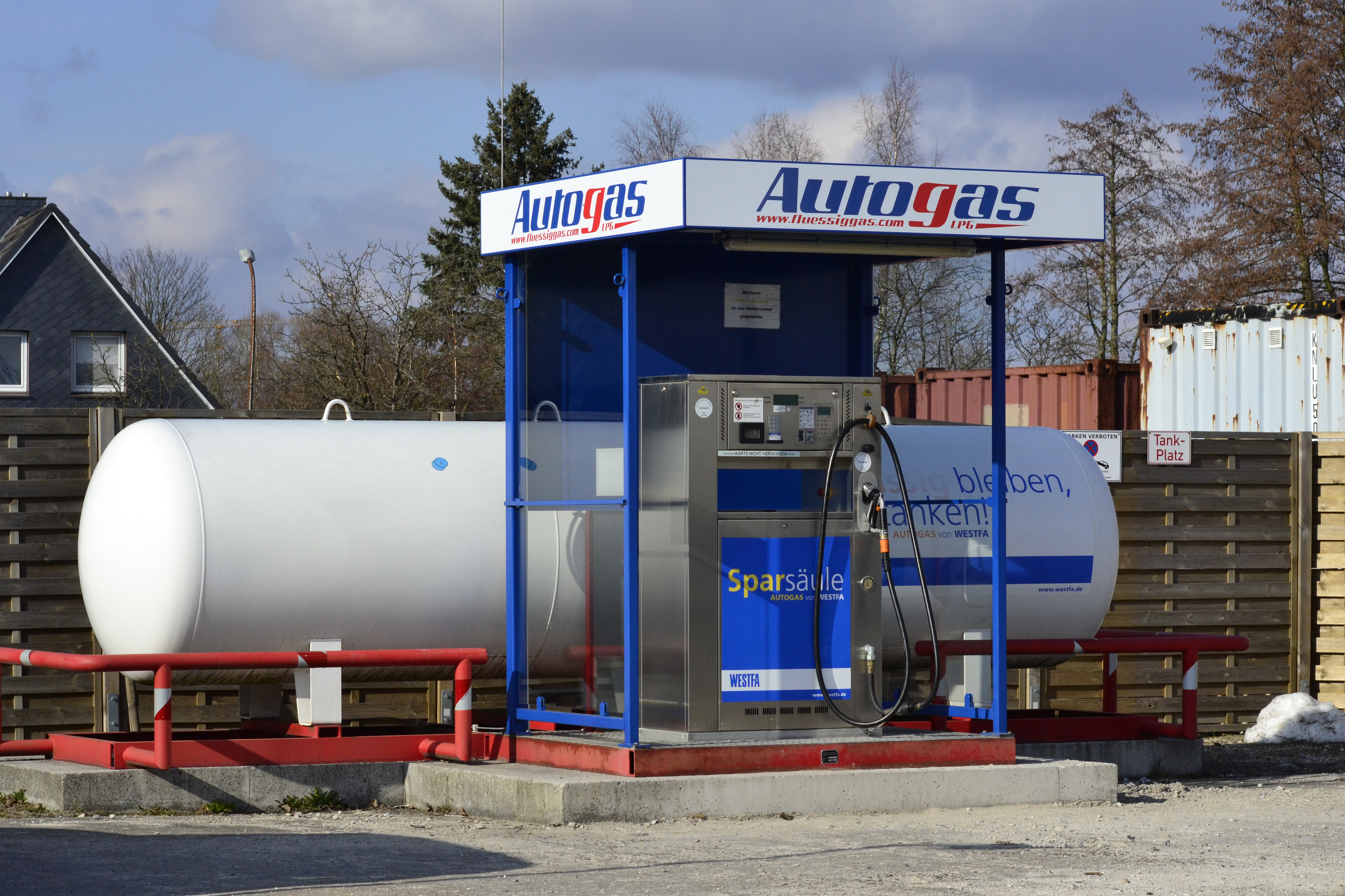 LPG Autogastankstelle. Zapfsäule mit dahinterliegendem Vorratstank.